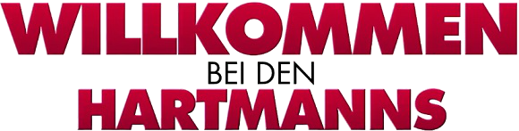 Titel zum Film Wilkommen bei den Hartmanns (2016).